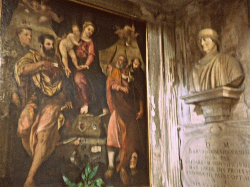 La pala di Paolo Pino nella chiesa di San Francesco Grande a Padova